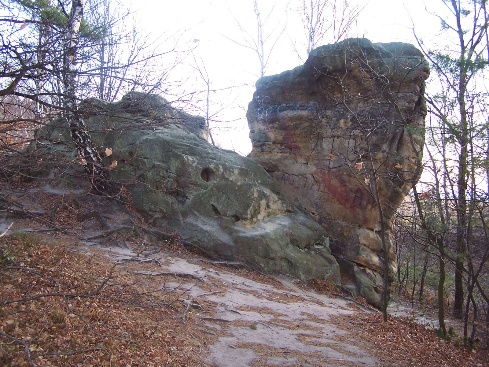 Skamieniałe Miasto (Pogórze Rożnowskie)